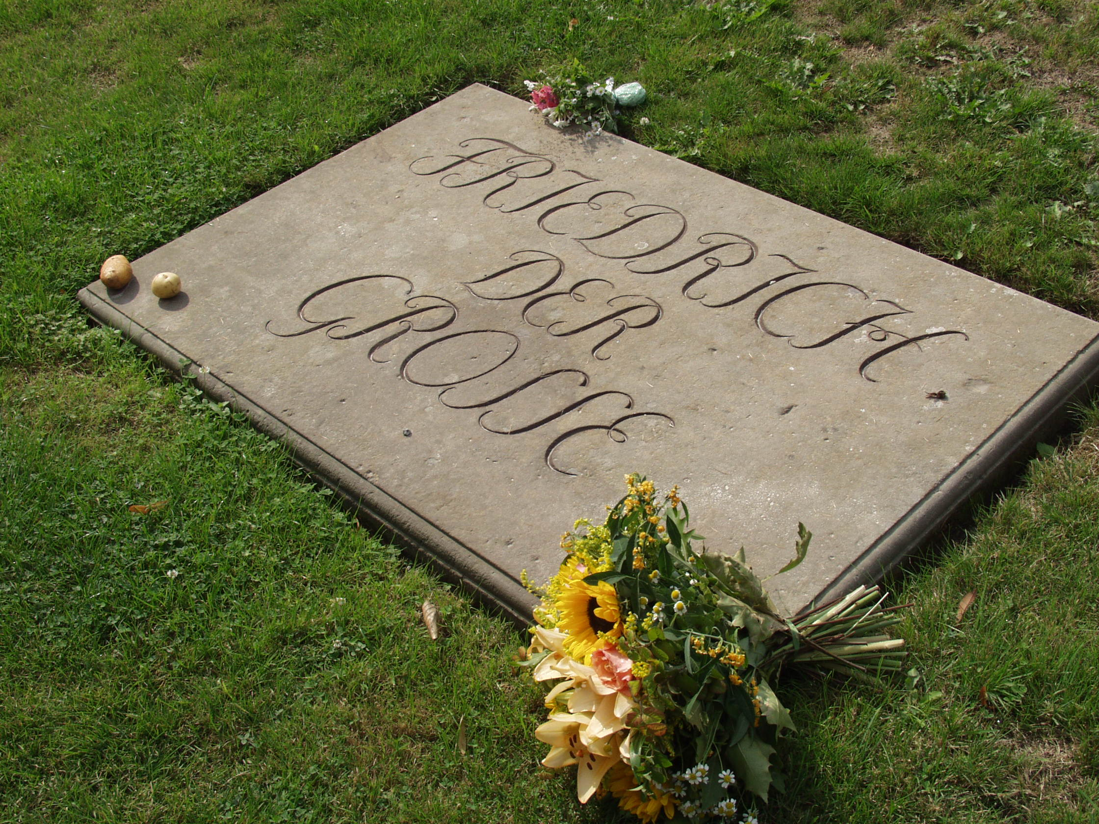 Grabplatte Friedrich der Große mit Blumen und Kartoffeln (Kartoffelkönig) in Sanssouci